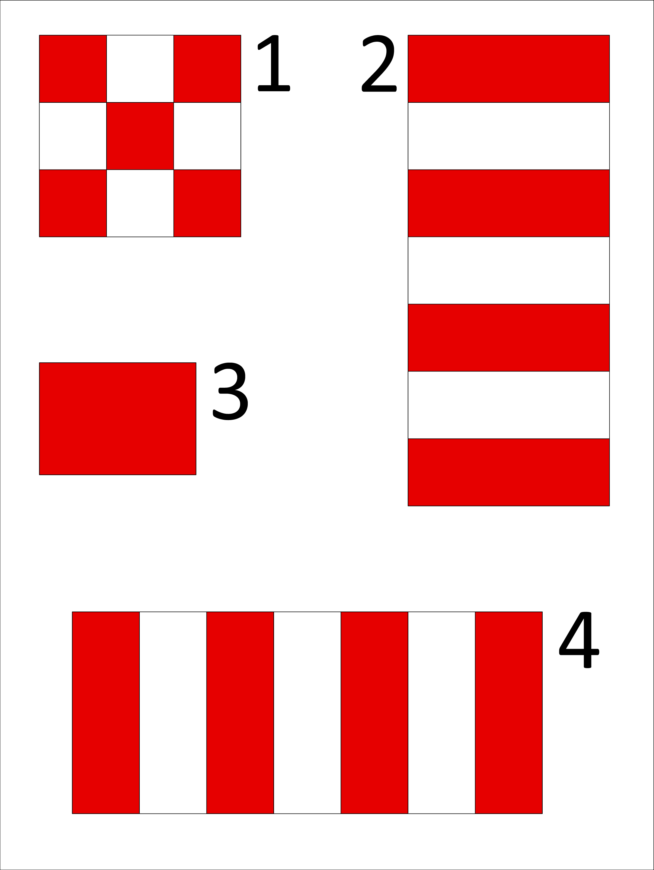 Tipologie di segnali diurni per ostacoli fissi all'interno o nelle vicinanze di un aerodromo.